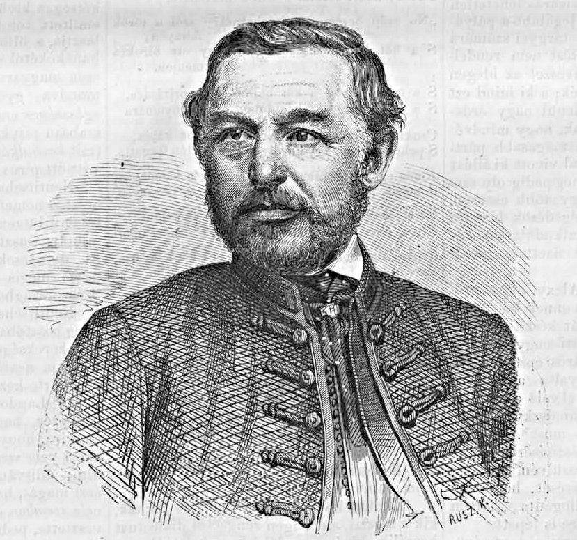 Alexy Károly Ede szobrász. Rusz Károly metszete (Vasárnapi Ujság, 1864. július 10.)